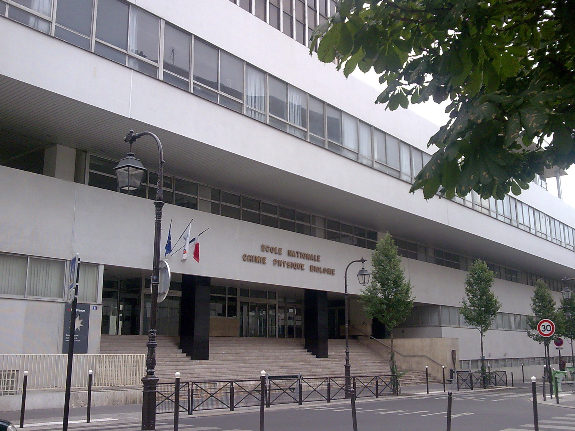 Ecole nationale de chimie, physique, et biologie de Paris (ENCPB), rue Pirandello dans le 13e arrondissement